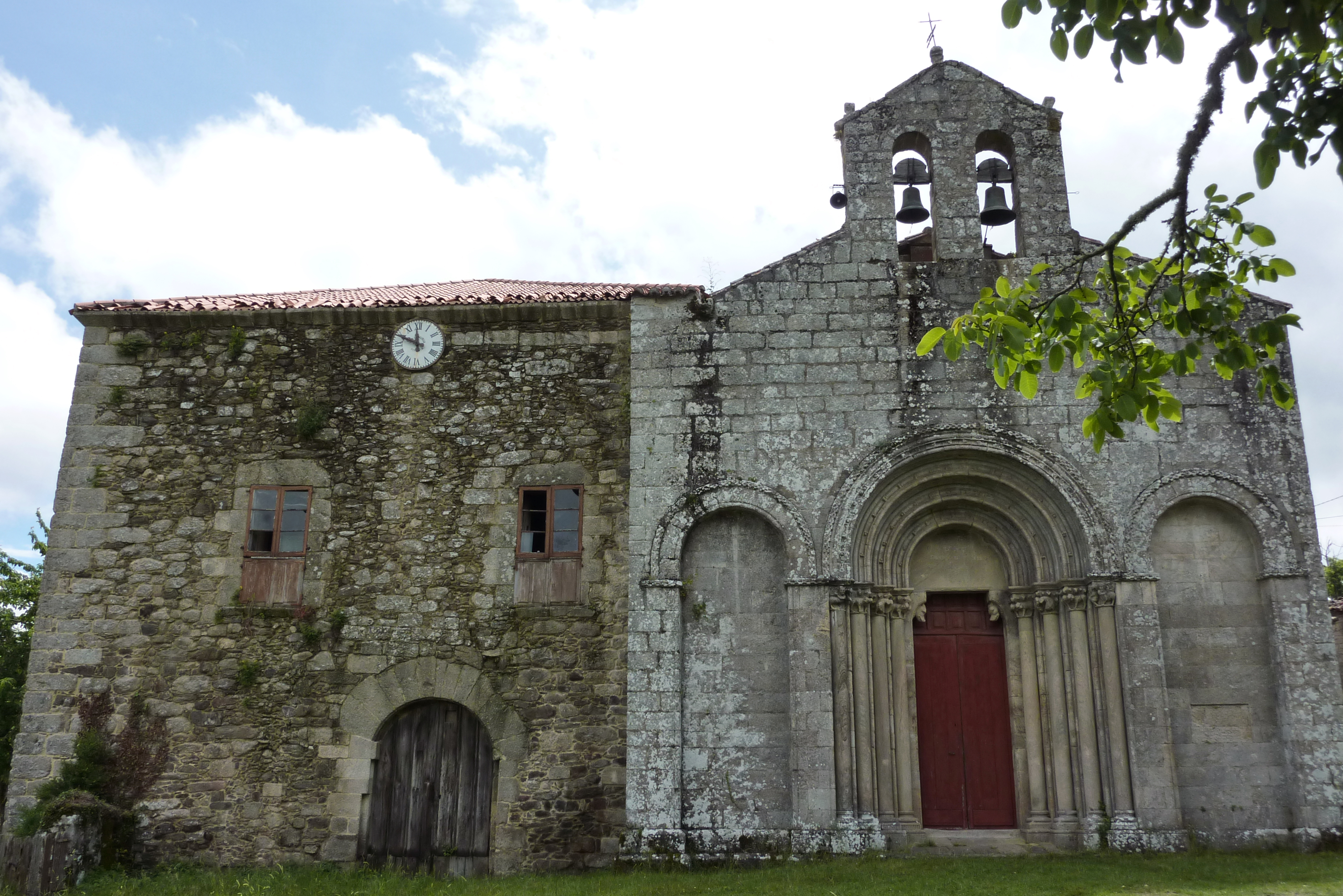 Katholische Pfarrkirche San Pelayo in Diomondi (Saviñao) in der spanischen Provinz Lugo (Galicien), Westfassade